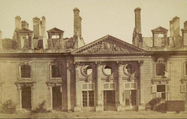 Le Château-Neuf de Meudon en 1871, après l'incendie. 21 Fi 76